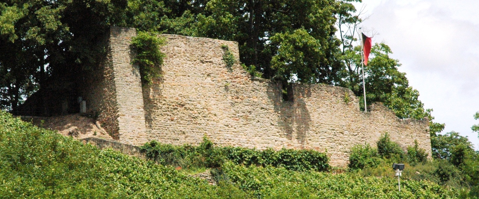 Burg Neu-Wolfstein